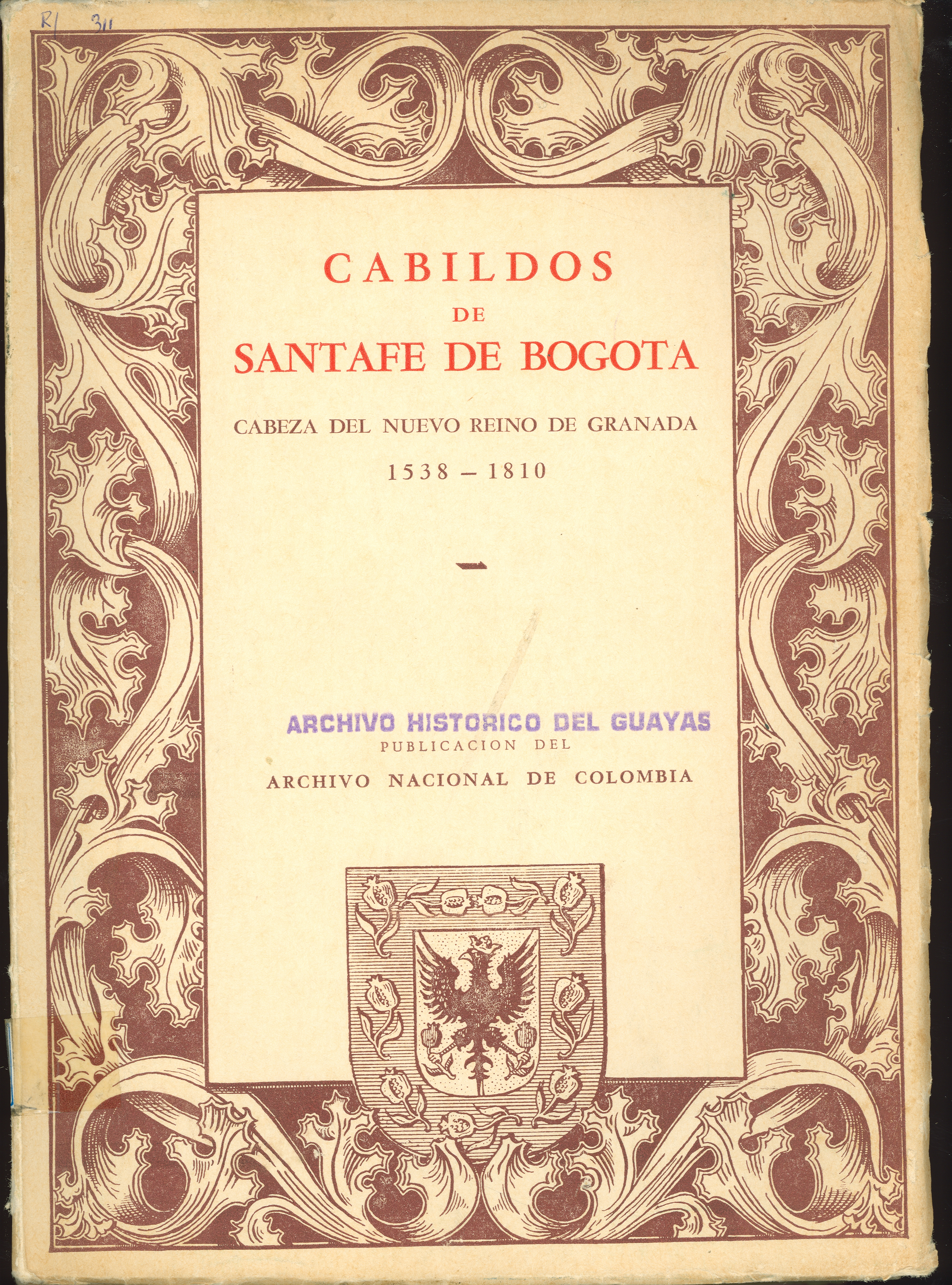 Ortega Ricaurte, Enrique. (1957).Cabildos de Santa Fe de Bogotá / Cabeza del Nuevo Reino de Granada 1538 – 1810 / Volumen XXVII – Publicación dirigida por Enrique Ortega Ricaurte Jefe del Archivo Nacional de Colombia con la colaboración de la Señorita Ana Rueda Briceño. Ministerio de Educación Nacional y Publicación del Archivo Nacional de Colombia de la Empresa Nacional de Publicaciones: Bogotá, Colombia. Año MCMLVII. Diapositiva de consulta publica hallada en los Fondos Bibliográficos del Archivo Histórico del Guayas (AHG); Guayaquil, Ecuador. Compartido y consultado por J. Javier García A.